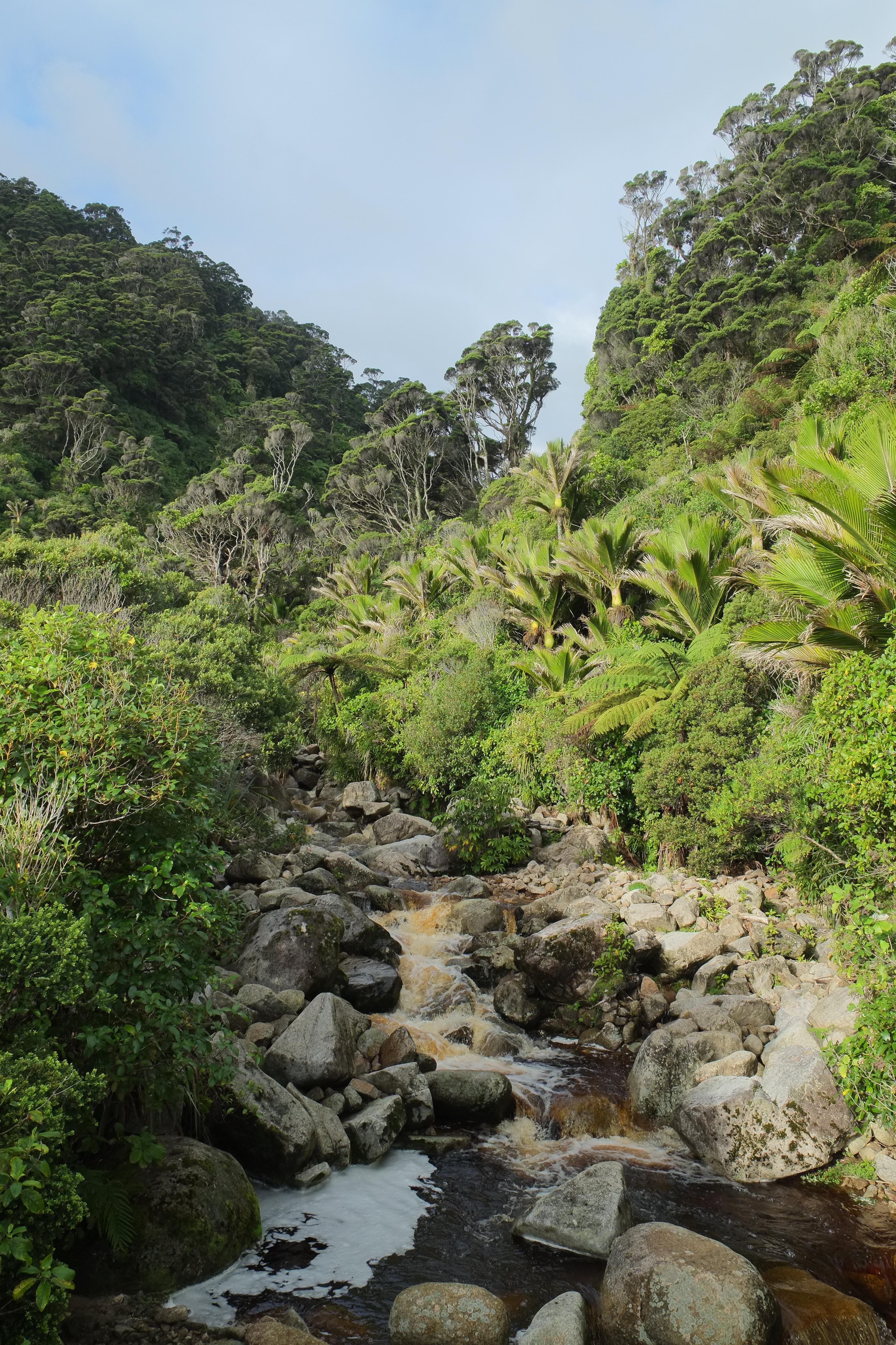 Nikau palms along stream at Scotts Beach in Kahurangi National Park